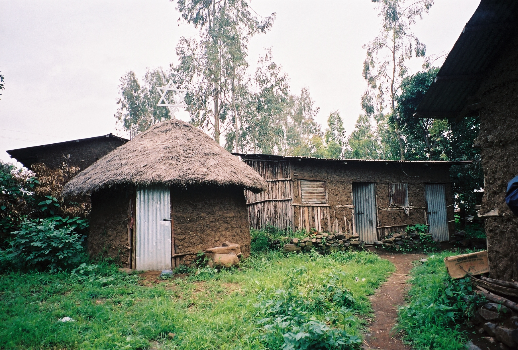 Wolleka, poblíž Gondaru, Etiopie